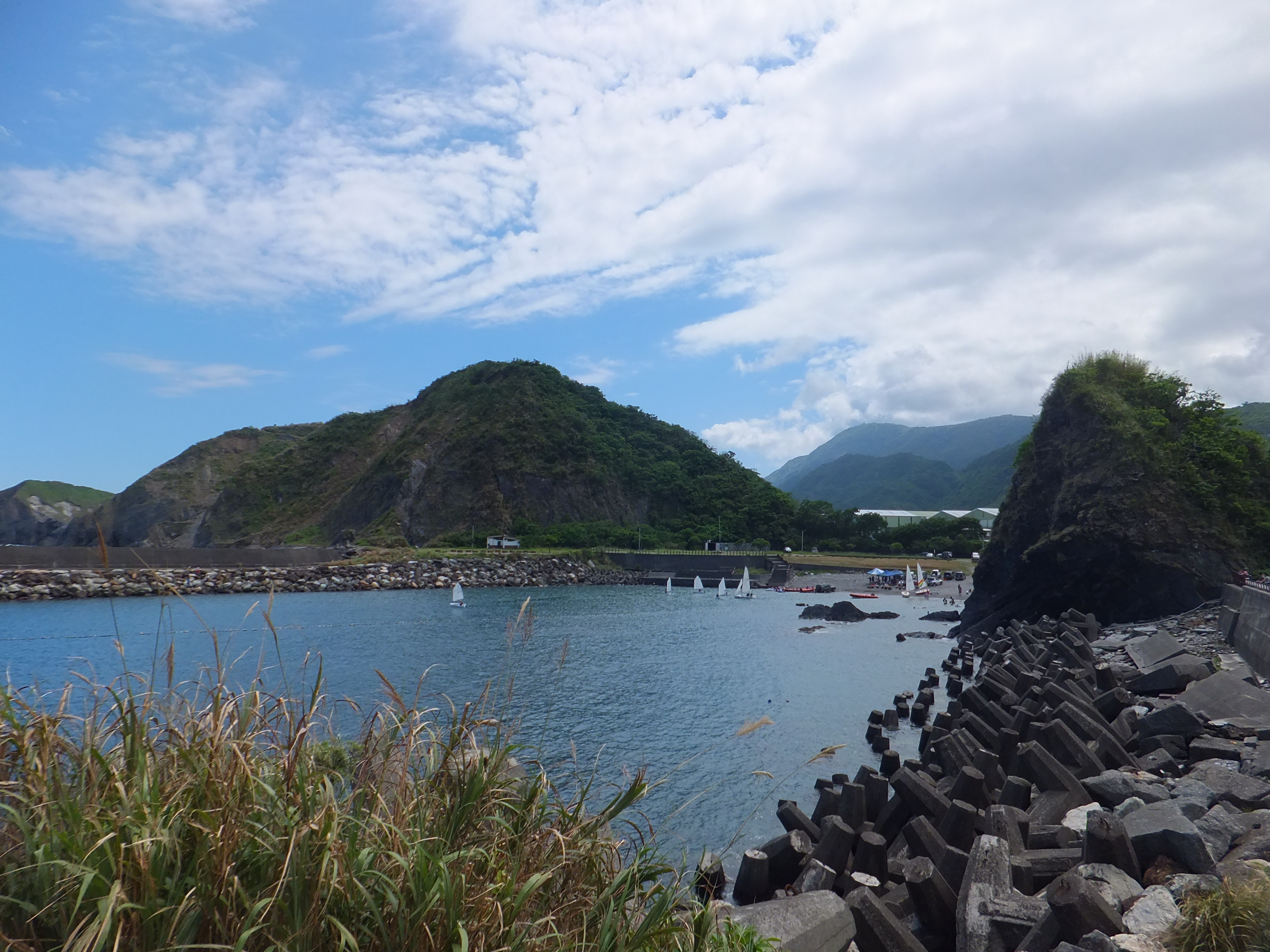 豆腐岬一景。